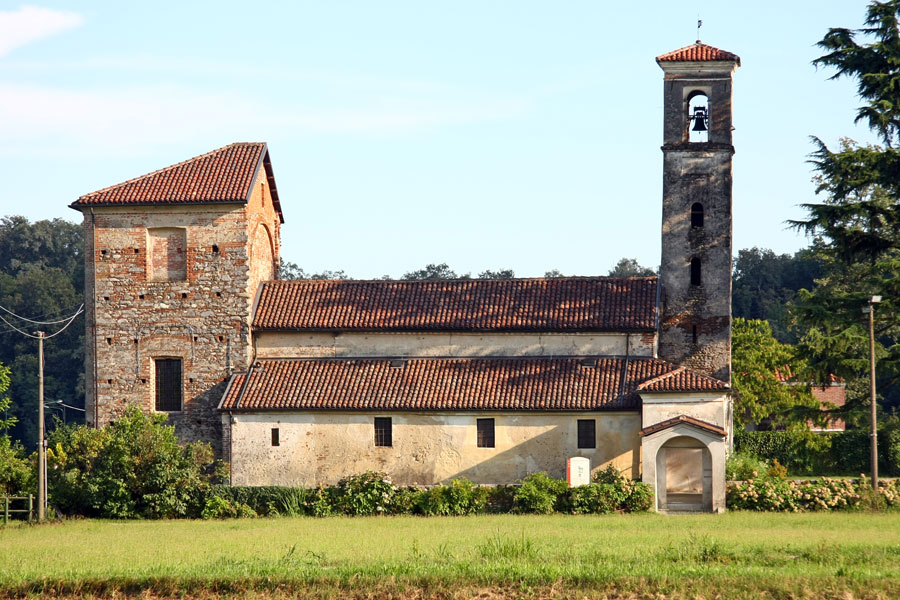 Chiesa medioevale dei Santi Pietro e Paolo a Cossato (BI)